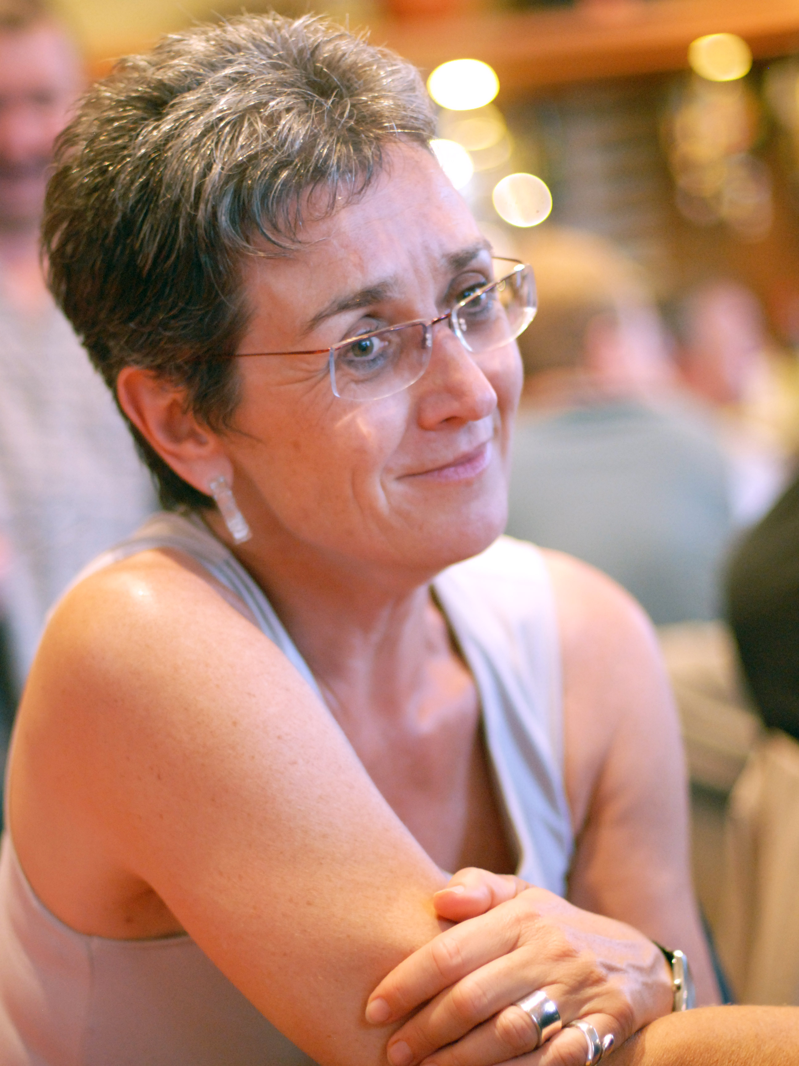 Die Europa-Abgeordnete Ulrike Lunacek bei einer Veranstaltung in Brüssel im Juni 2010.